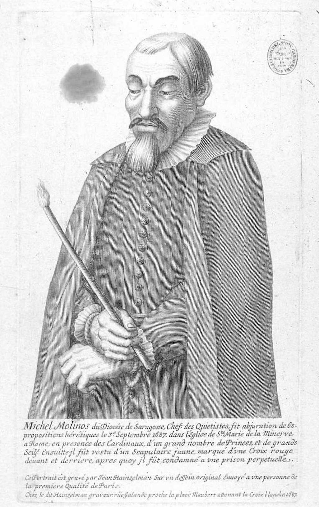 Miguel de Molinos, 1687, buril de Johann Hainzelman. Inscripción: "Michel Molinos du Diocése de Saragosse Chef des Quietistes, fit abjuration de 68 propositions hérétiques le 3e. Septembre1687 dans l'Eglise de Ste. Marie de la Minerve a Rome en presence des Cardinaux, d'un grand nombre de Princes et de grands Seigrs. Ensuitte. jl fût vestu d'un Scapulaire jaune, marqué d'vne Croix rouge deuant et derriere, apres quoy jl fut condamné a vne prison perpetuelle". Biblioteca Nacional de España